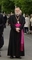 Nederlandse bisschop Jos Punt in Lourdes, 2008